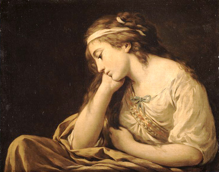 La Mélancolie